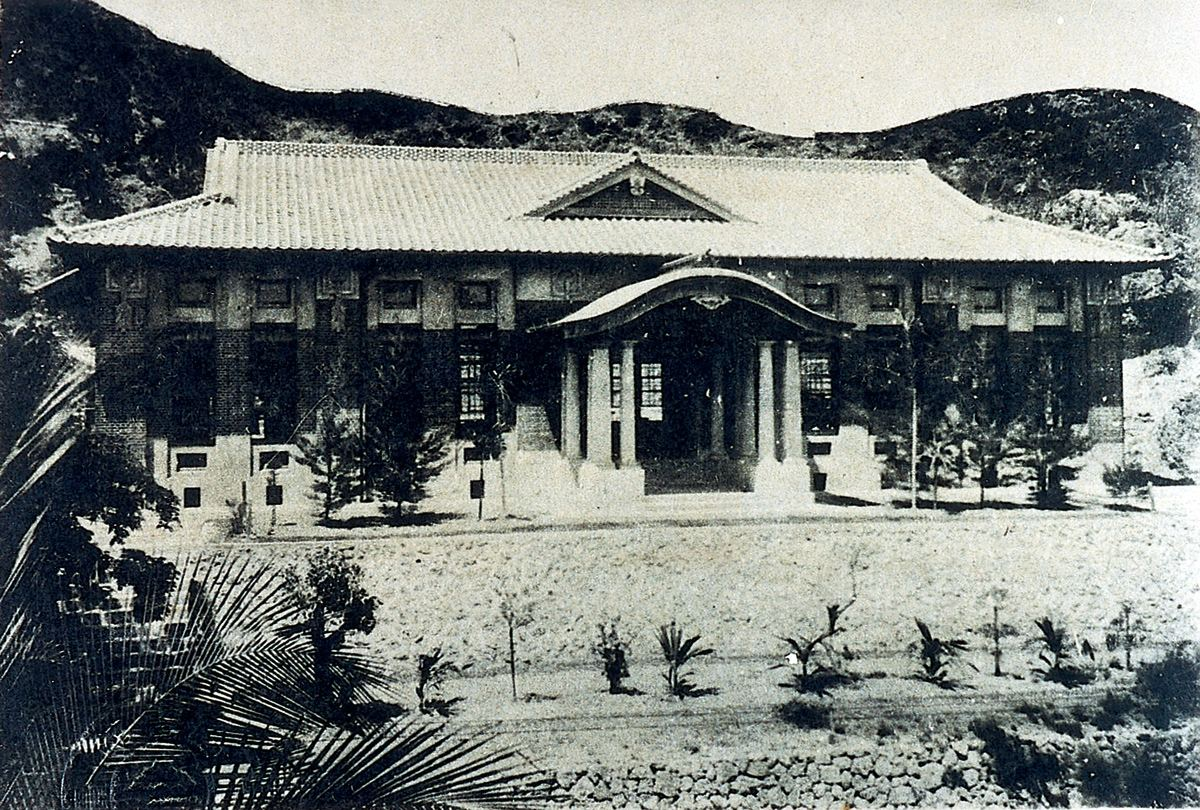 中文（台灣）: 高雄武德殿振武館 舊照